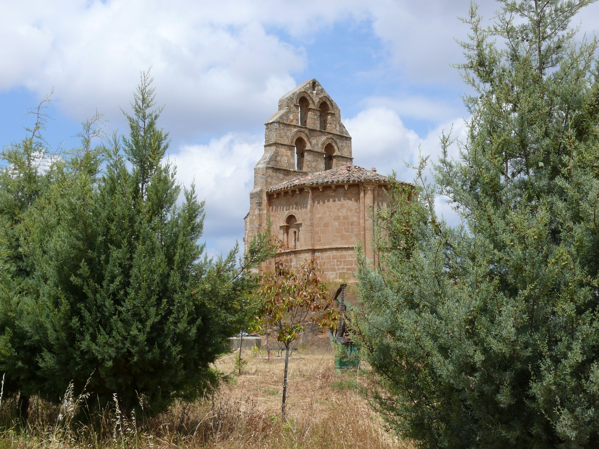 Ermita de San Fagún